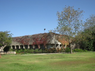 Kfar Etzion כפר עציון